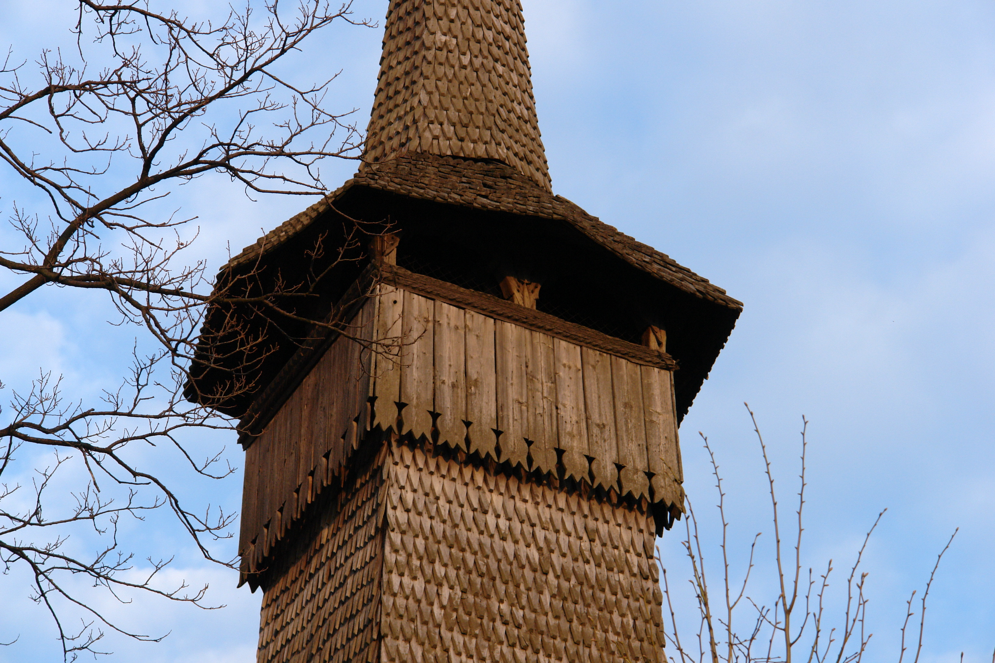 Sósfalu (1899-ig Sós-Ujfalu, ukránul Новоселиця (Novoszelicja / Novoselitsia), oroszul Новоселица (Novoszelica / Novoselica), románul Dumbrava) falu, görög katolikus fatemploma Kárpátalján a Nagyszőlősi járásban.